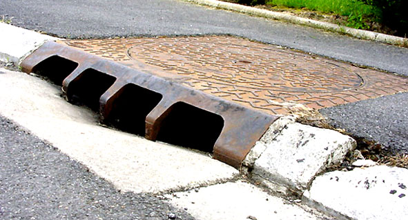 Dispositif de démonstration de l'association ADOPTA ; association Loi 1901 réunissant la ville de Douai, le Conseil régional du Nord Pas-de-Calais et l'Agence de l'eau Artois picardie, dédiée à l'expérimentation et à la prompotion de techniques alternatives de lutte contre les inondations et le ruissellement urbain. cet avaloir ne conduit pas l'eau dans le réseau d'égout, mais dans une structure réservoir d'où elle sera lentement libérée, sans contribuer à un pic d'inondation.